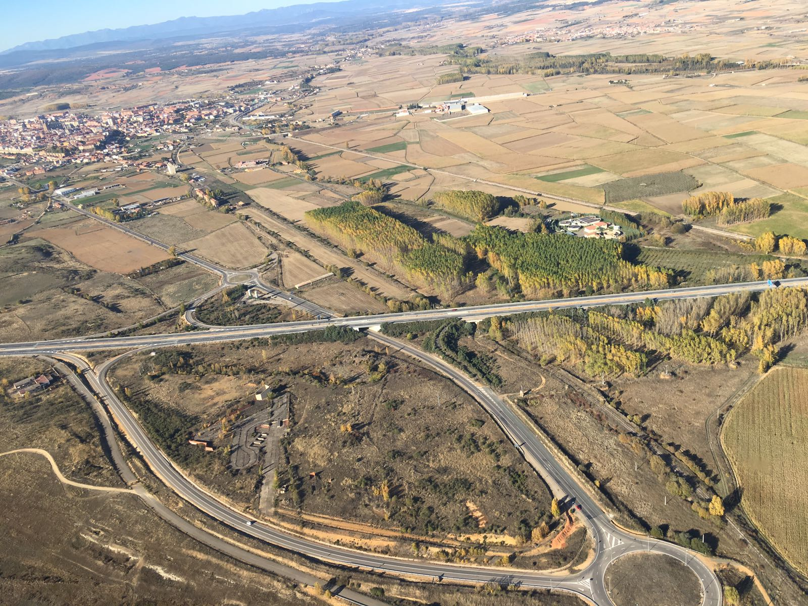 Vista aérea de Astorga (León, España).